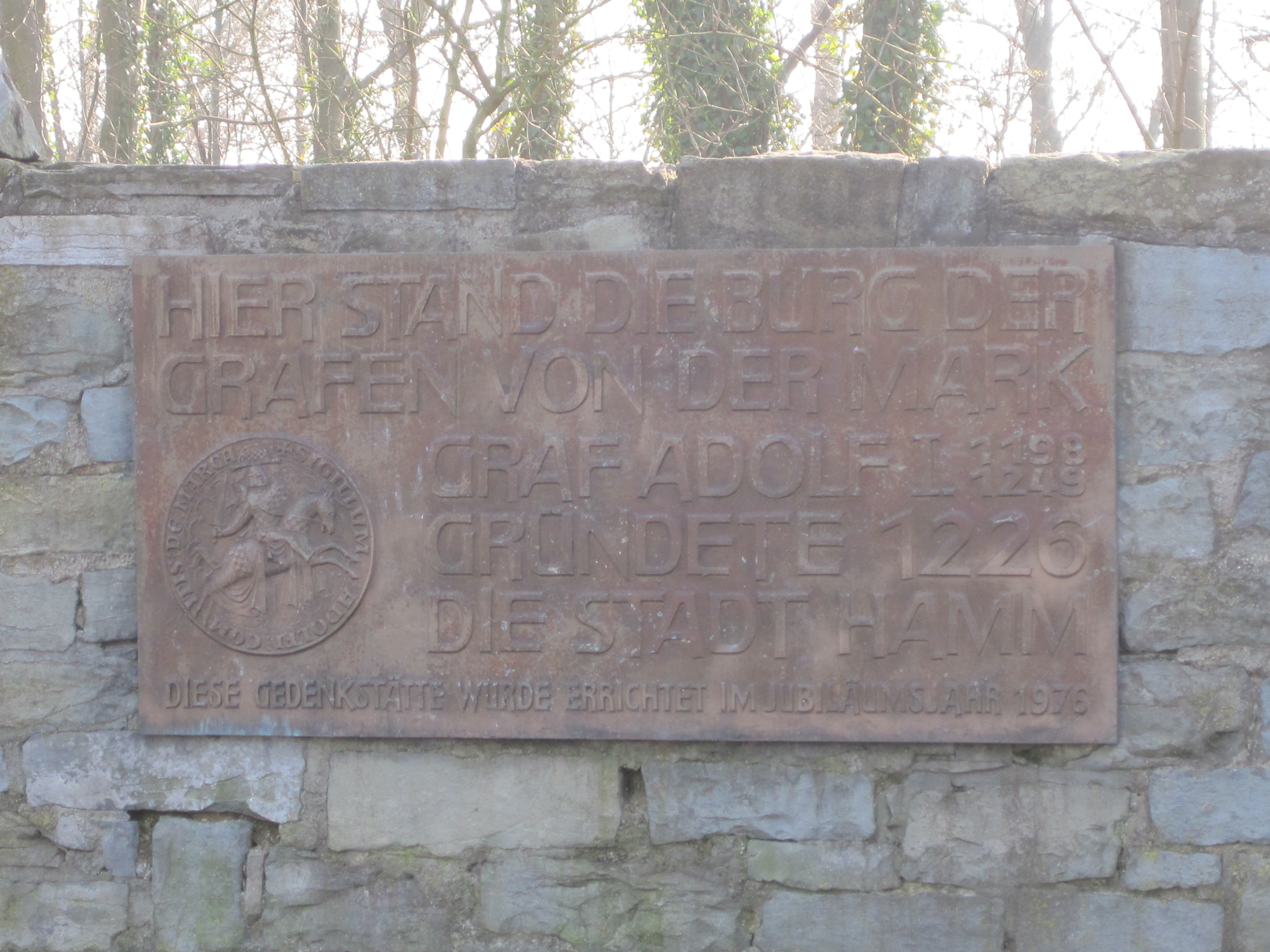 Das Foto zeigt einen Gedenkstein aus dem Jahre 1976 auf der Hauptburg des Burghügels in der Mark in Hamm. Er erinnert an die Gründung der Stadt Hamm im Jahre 1226 durch Adolf I. Graf von der Mark.